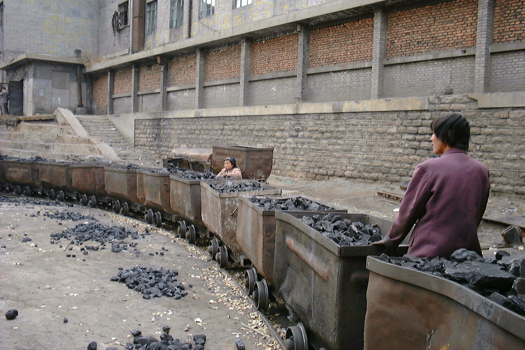 Jin Hua Gong Mine, Datong, Shanxi, China